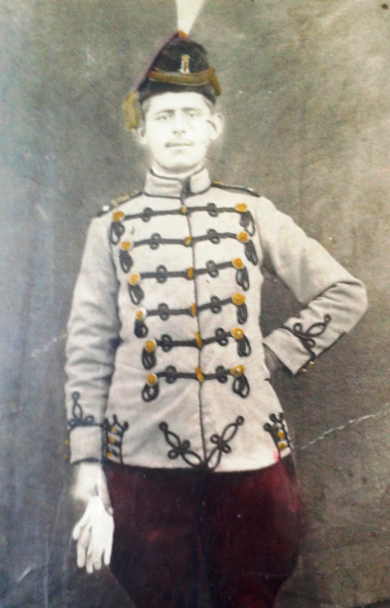 Гардиста Светислав Јеремић из Градца код Ваљева у служби у Краљевој Гарди.